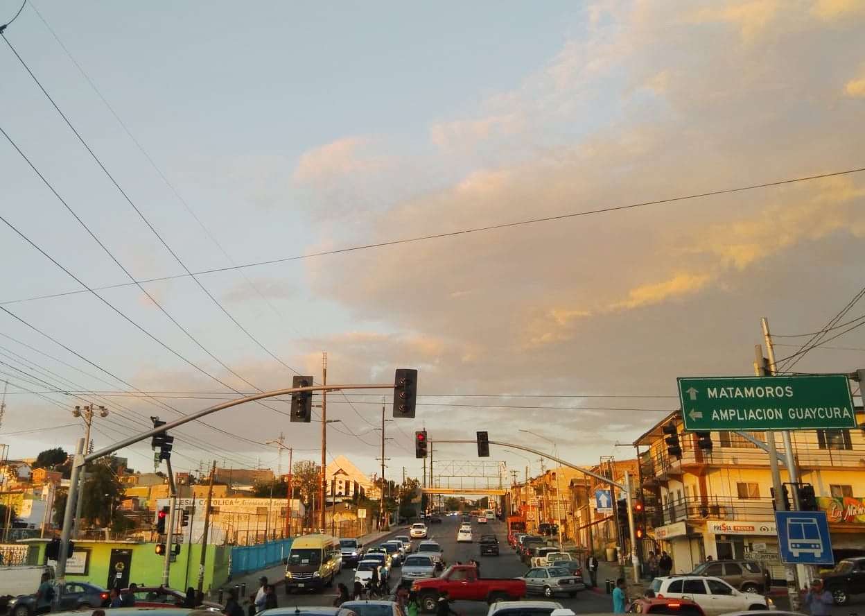 Crucero entre el Blvr. Cucapah y la Av. Ampliación Guaycura